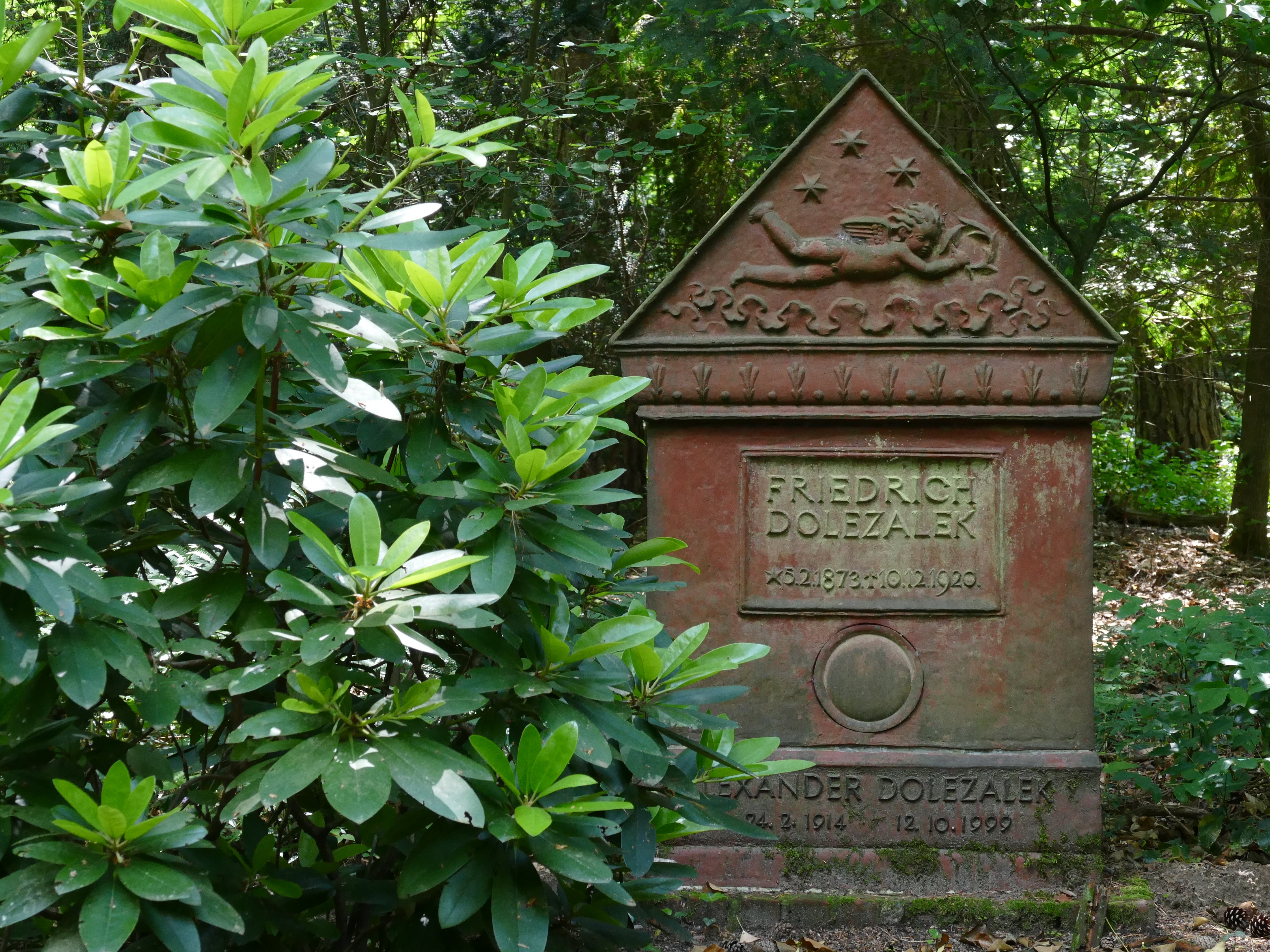 Grabstein auf dem Grab von Friedrich Dolezalek und Alexander Dolezalek auf dem Südwestkirchhof Stahnsdorf